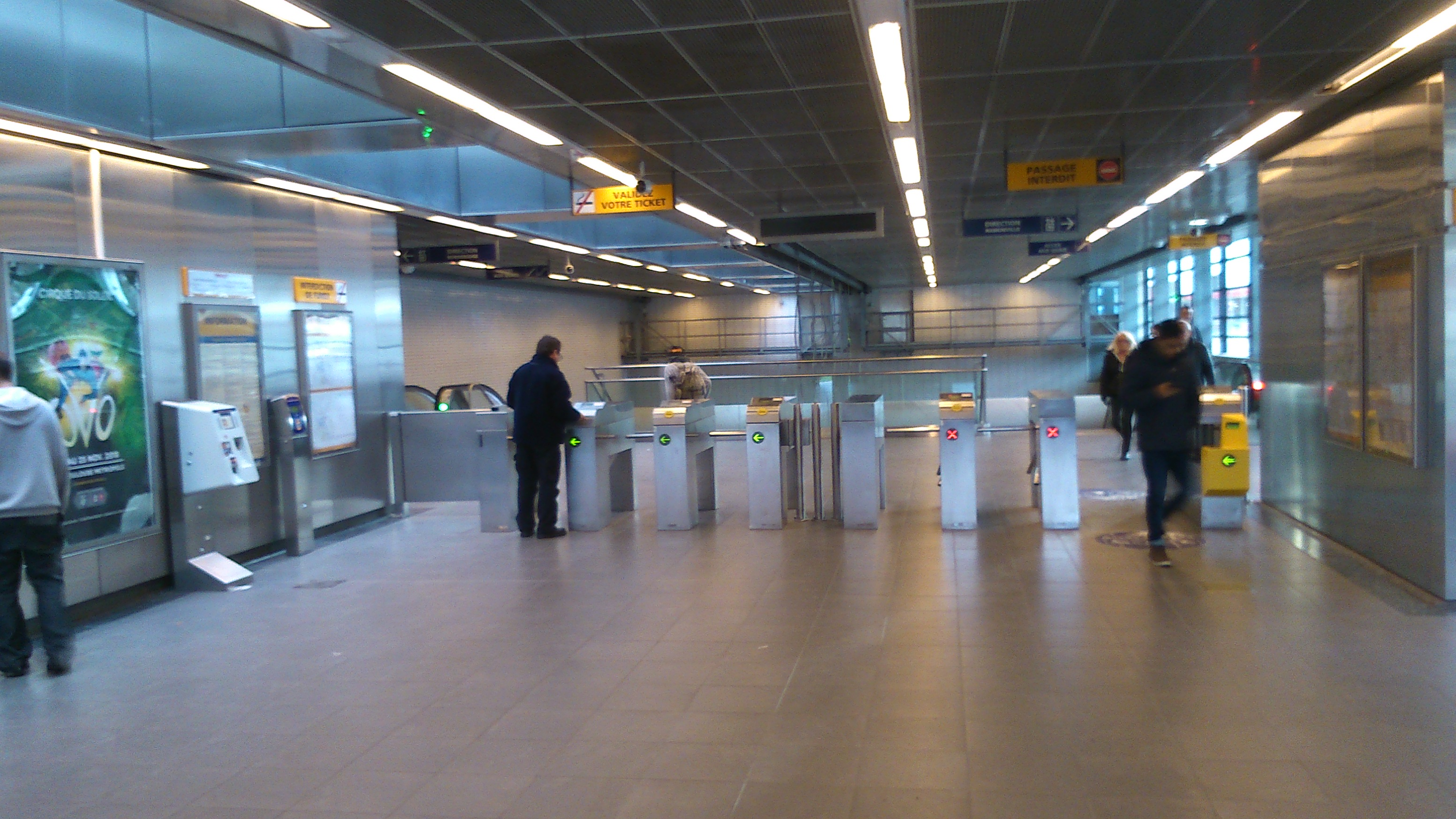 Rez-de-chaussée de la station Empalot de la ligne B du métro de Toulouse